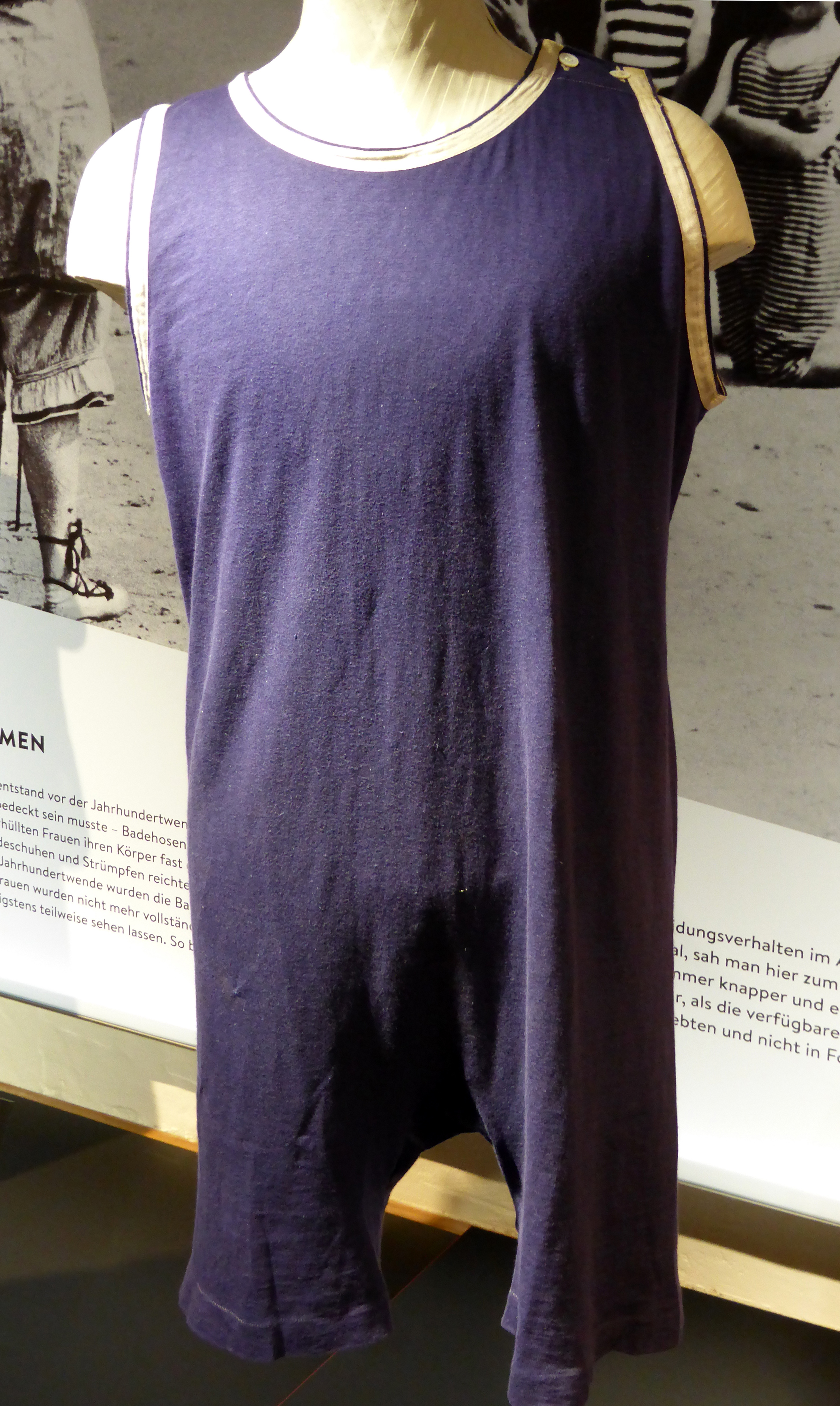 Sonderausstellung: Macht der Mode. Herren-Badeanzug 1920er Jahre im Textilmuseum Cromford in Ratingen.